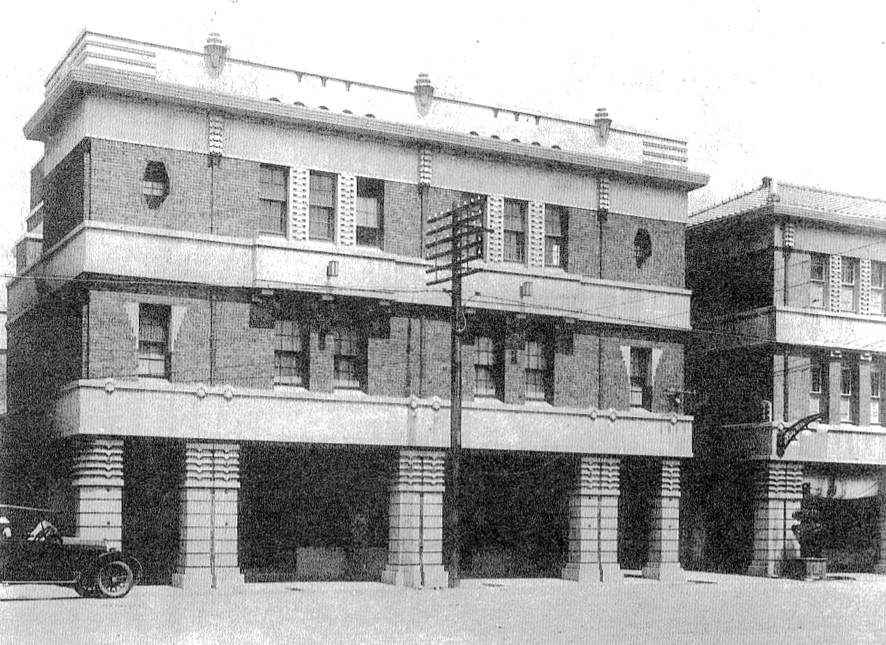 中文（台灣）: 辰馬商會台北本店，為臺北市歷史建築，現由彰化銀行使用